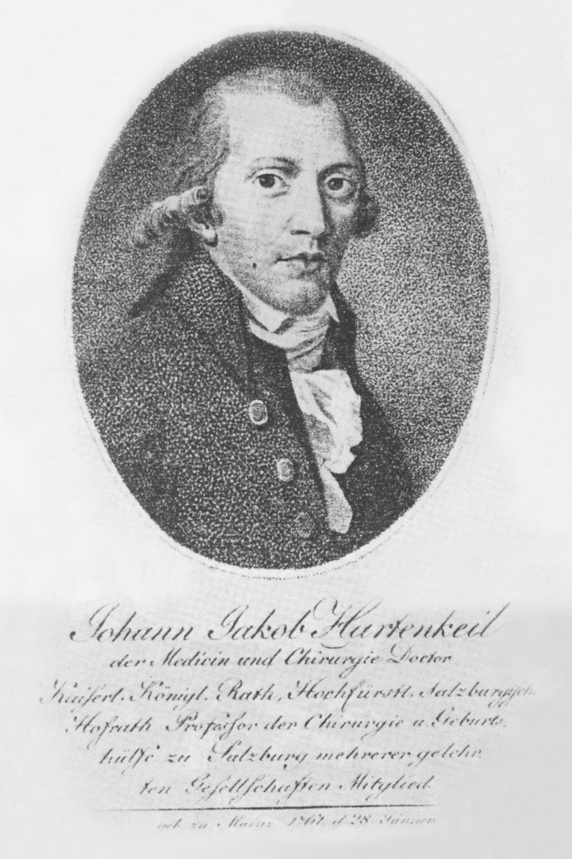 Dr. Johann Jakob Hartenkeil im Jahr 1801, Kupferstich von Ferdinand Bollinger